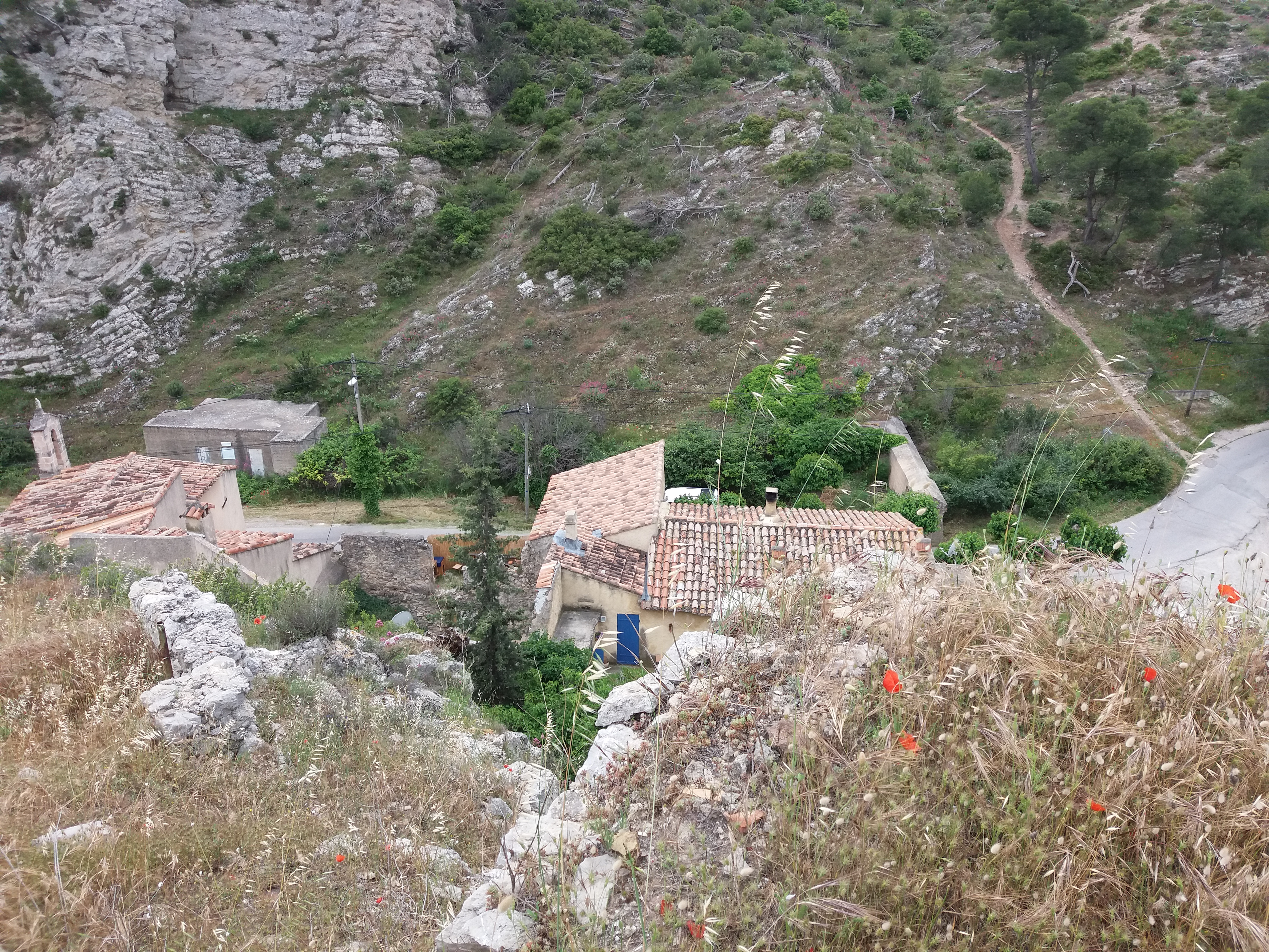 Chemin de la Nerthe : chapelle Notre-Dame de la Galline, casemate et fortification allemandes.